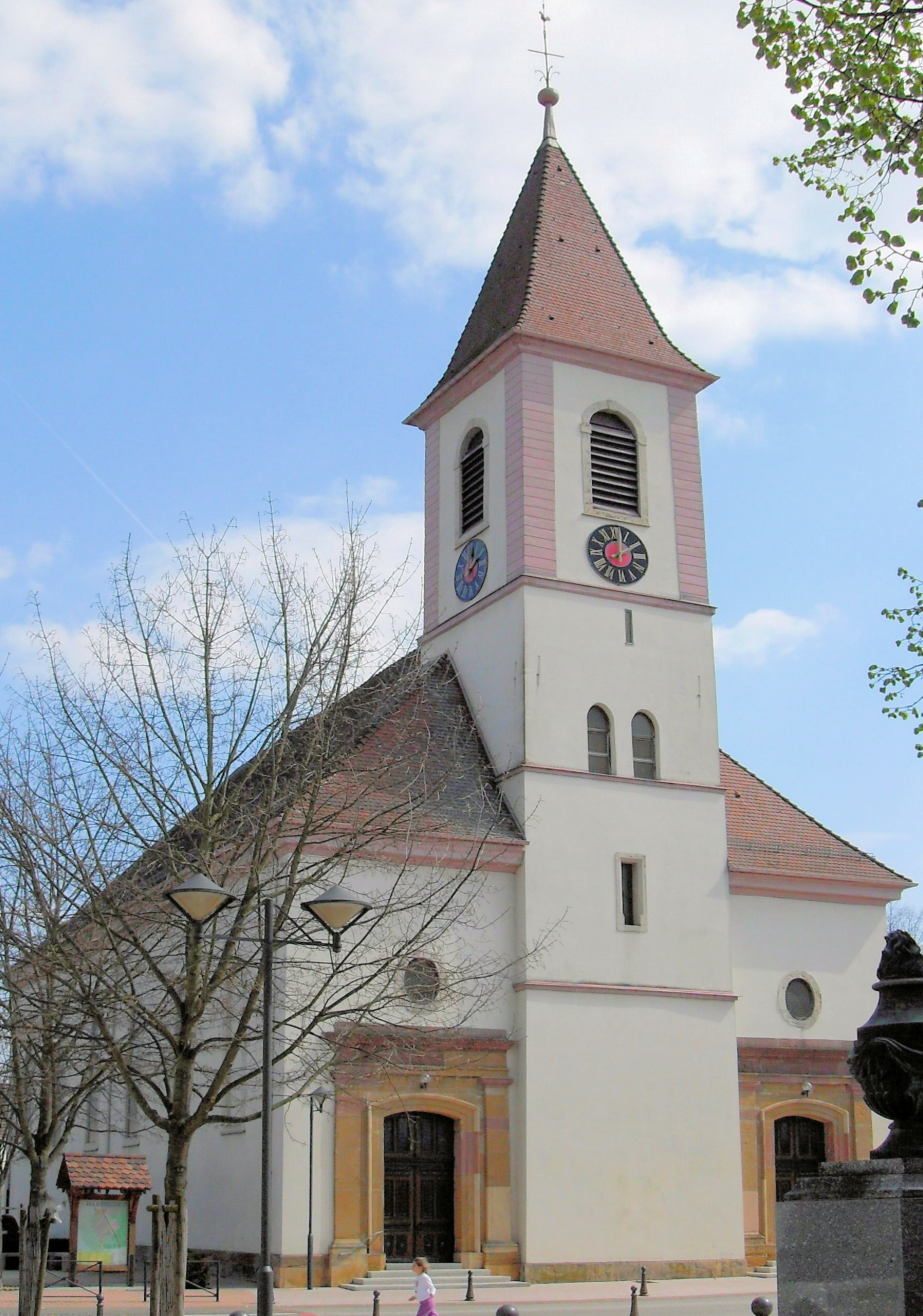 L'église Saint-Martin à Habsheim